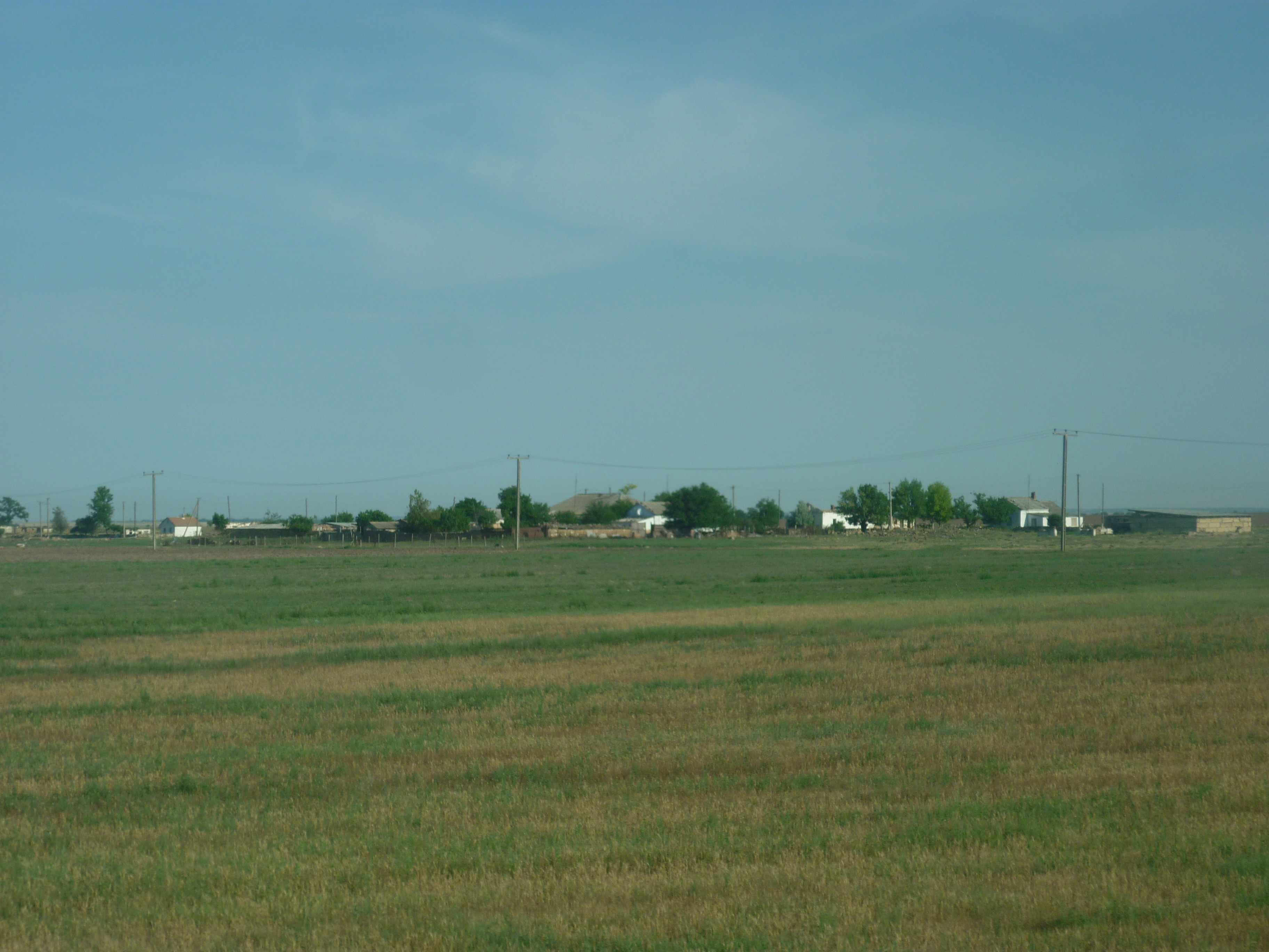 село Сєверне Роздольненського району Автономної республіки Крим